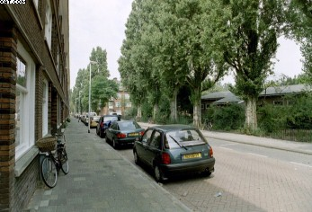 De Grieksestraat, tegenover het voormalige Rijks Serum Instituut in Oud-Mathenesse.